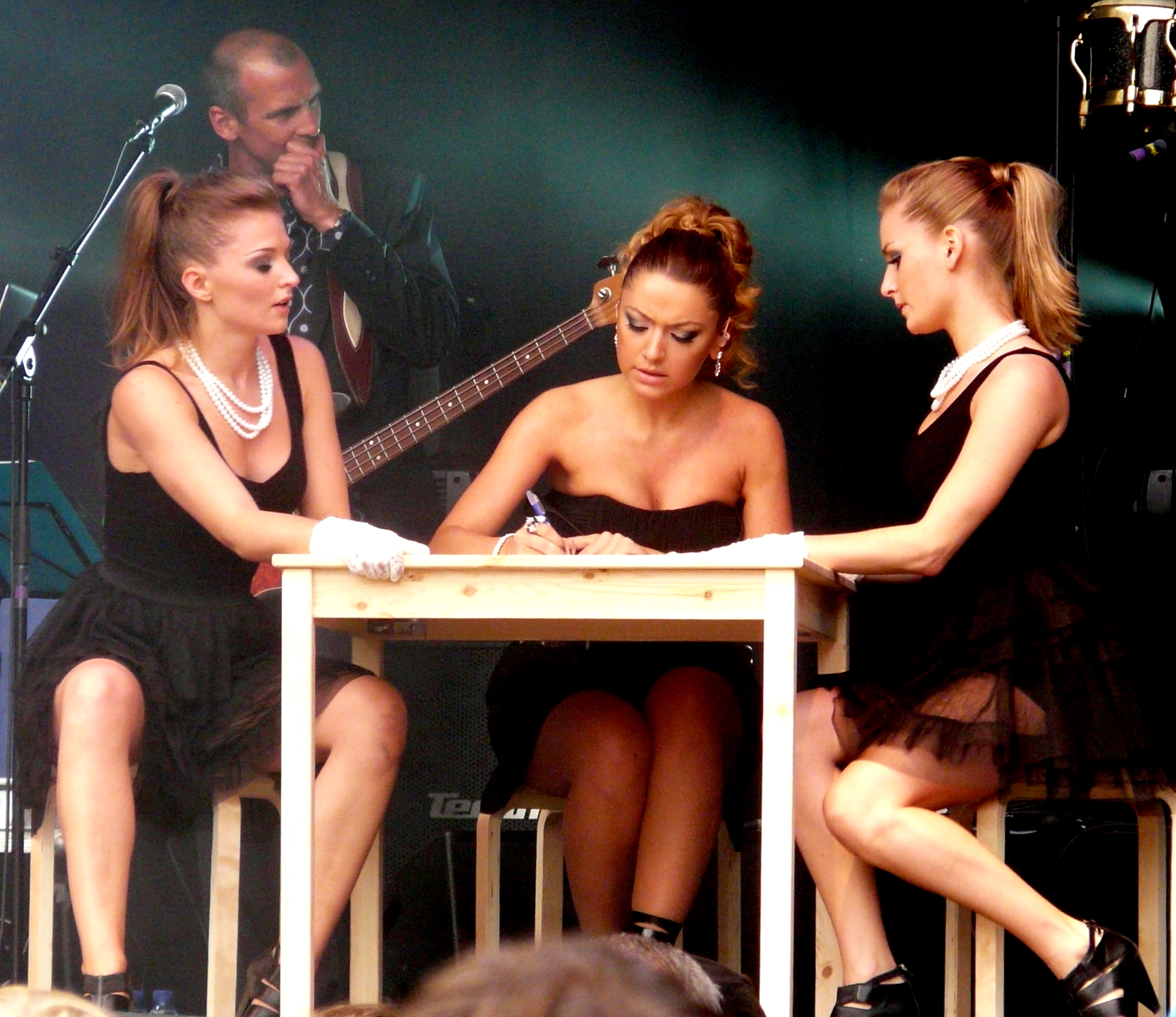 Hadise Açıkgöz, Turkish singer (with Turkish and Belgian citizenship), in a performance & concert @ the Maanrock festival, Mechelen Here she performs an autobiographical song about long distance relationships, writing a letter to her boyfriend who lives in Turkey. Nederlandse vertaling : plots, in het midden van een optreden, dacht Hadise eraan dat ze haar belastingsbrief nog moest invullen. Ze maakte er meteen werk van, met assistentie van haar privé-secretaressen. (Van behoorlijk ver gefotografeerd)